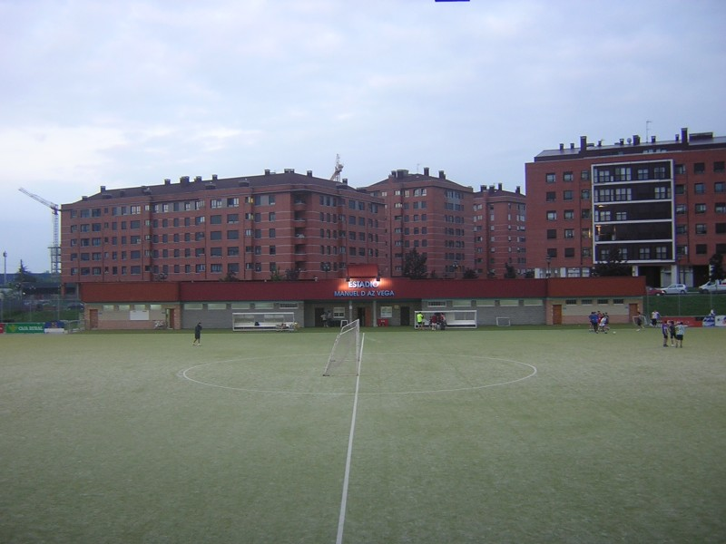 Foto del Estadio Municipal Manuel Díaz Vega de La Corredoría, antes del cambio del césped sintético.